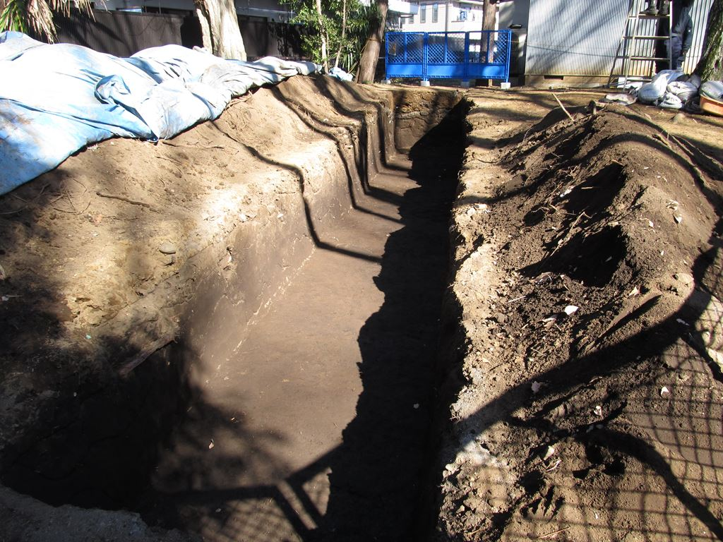 武蔵国府八幡宮～八幡町地域公園（八幡町緑地）発掘現場。東京都府中市。